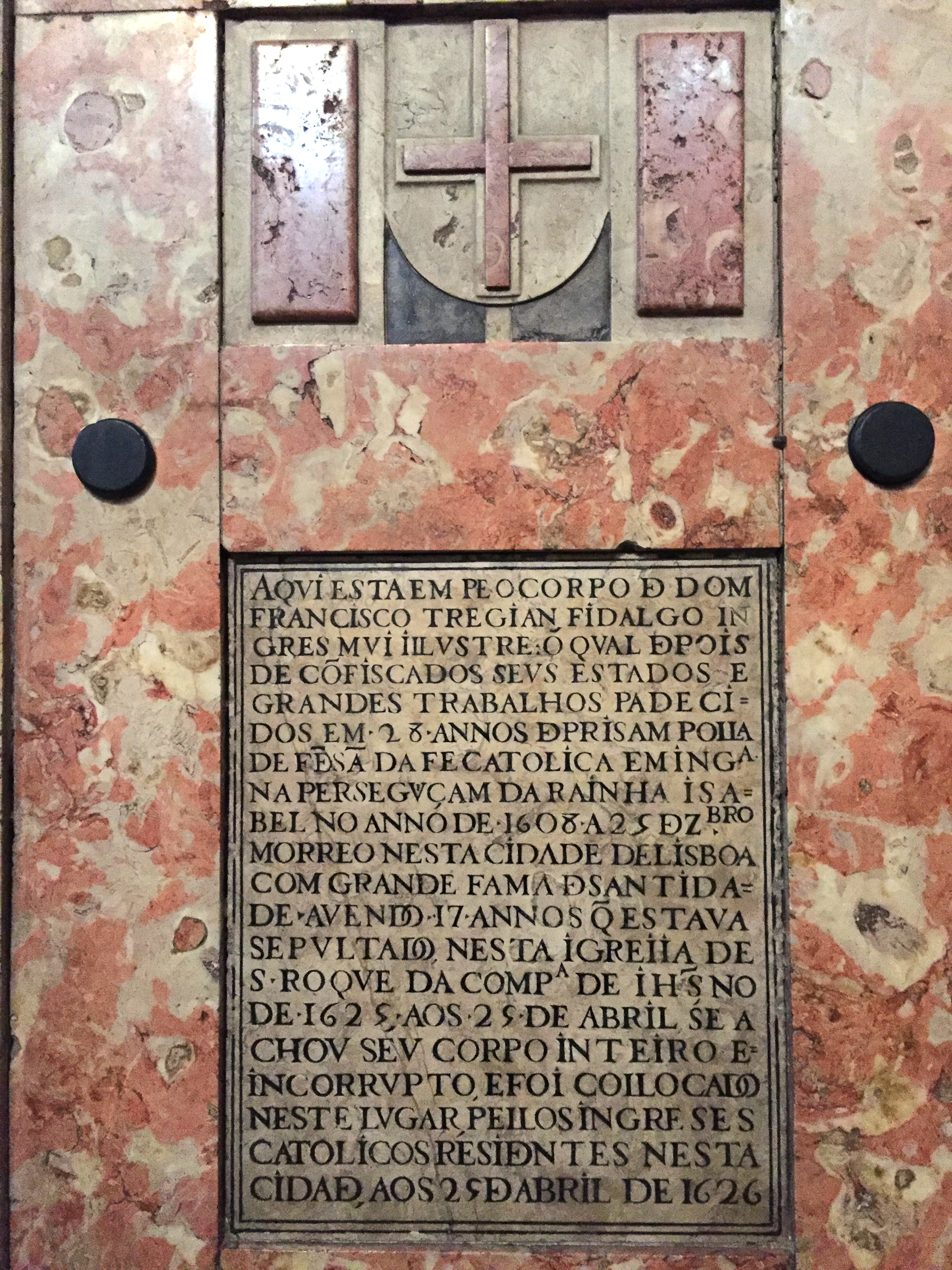 Lápida funeraria de Francis Tregian en la iglesia de San Roque de Lisboa (Portugal) que dice "Aqui esta em pe o corpo de Dom Francisco Tregian fidalgo ingres mui illustre: o qual depois de confiscados seus estados e grandes trabalhos padecidos em 28 annos deprisam polla defensam da fe catolica em Inglaterra na perseguçam da rainha Isabel no anno de 1608 a 25 dezembro morreo nesta cidade de Lisboa com grande fama de santidade. Avendo 17 annos que estava sepultado nesta igreiia de S. Roque da Companhia de IHS no de 1625 aos 25 de abril se achou seu corpo inteiro e incorrupto e foi coilocado neste lugar peilos ingreses catolicos residentes nesta cidad, aos 25 de abril de 1626." Traducción: "Aquí está de pie el cuerpo de Don Francisco Tregian hidalgo inglés muy ilustre: el cual, después de confiscados sus estados y padecidos grandes sufrimientos a lo largo de 28 años por la defensa de la fe católica en Inglaterra durante la persecución de la reina Isabel, en el año de 1608 a 25 de diciembre murió en esta ciudad de Lisboa con gran fama de santidad. Hacía 17 años que estaba sepultado en esta iglesia de S. Roque de la Compañía de Jesús cuando el 25 de abril de 1625 se halló su cuerpo entero e incorrupto y fue colocado en este lugar por los ingleses católicos residentes en esta ciudad, el 25 de abril de 1626."